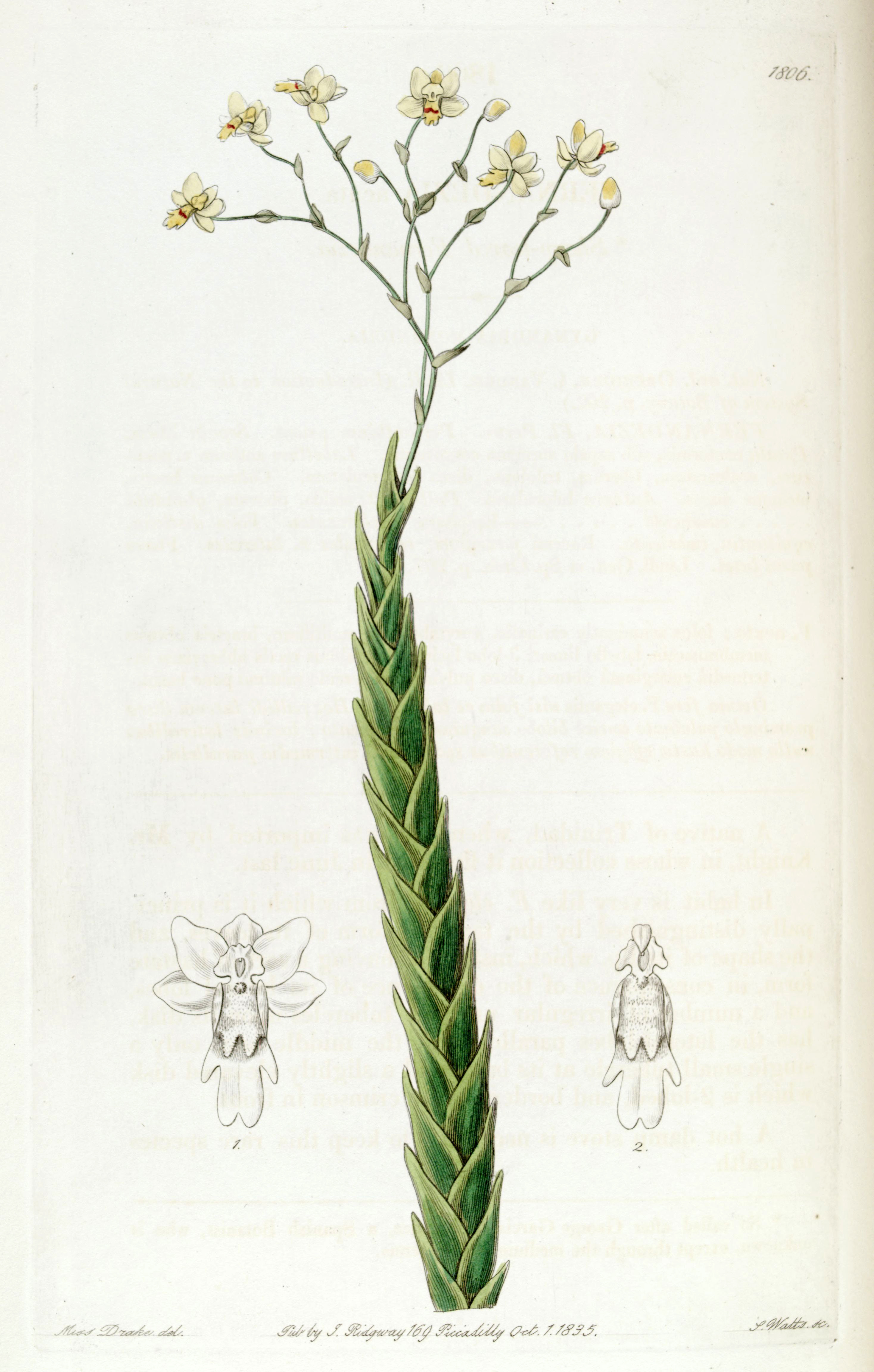 Lockhartia acuta (as syn. Fernandezia acuta)